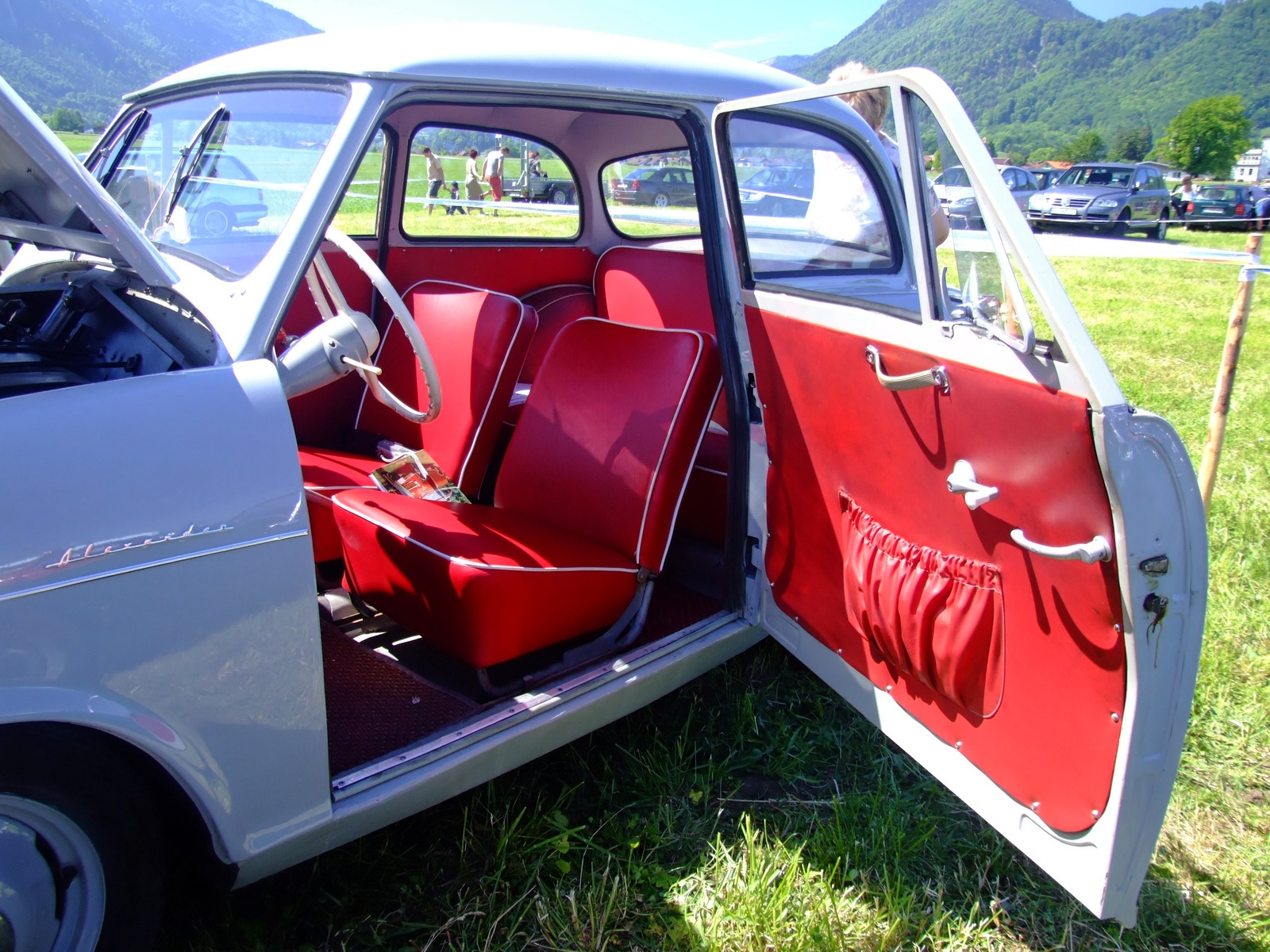 Quelle: selbst fotografiert, 05/2007 Fotograf: Späth Chr.